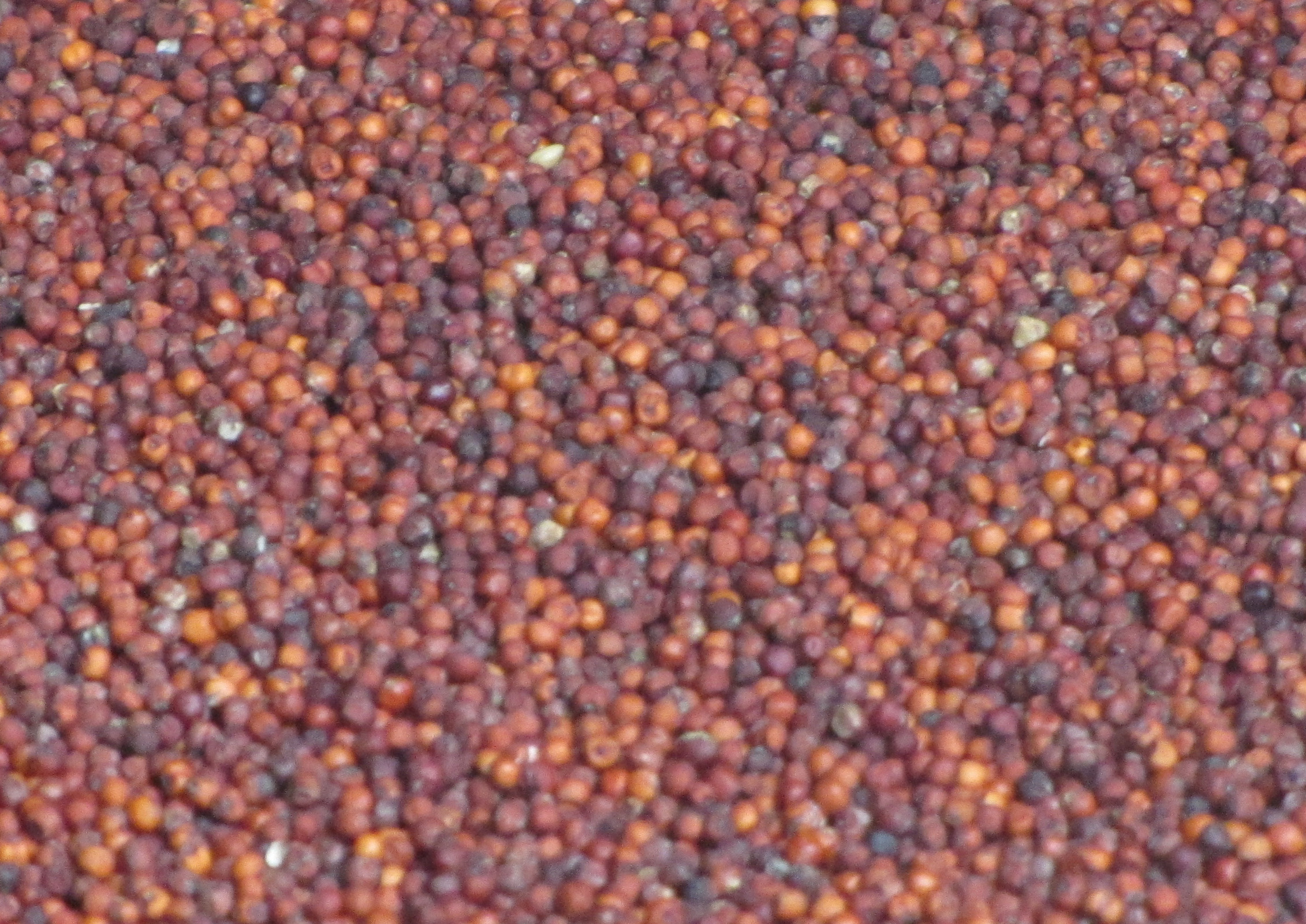 கேழ்வரகு. கேழ் = செந்நிறம். செந்நிற வரகு = கேழ்வரகு. அளவிலும் உருவிலும் வரகரிசியும் கேழ்வரகும் ஒன்றுபோலவே இருக்கும். கேழ்வரகுக் கதிர் நமது கைவிரல்கள் குவிந்துள்ளது போல இருக்கும்.